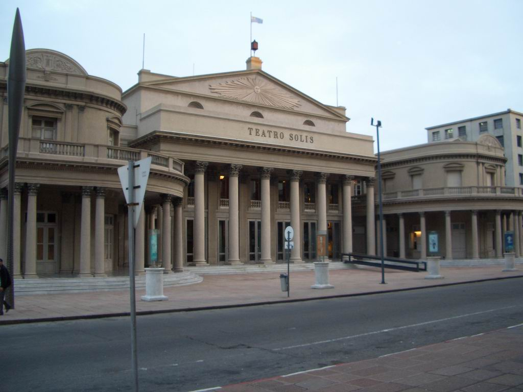 Vista del Teatro Solís, Montevideo, Uruguay.